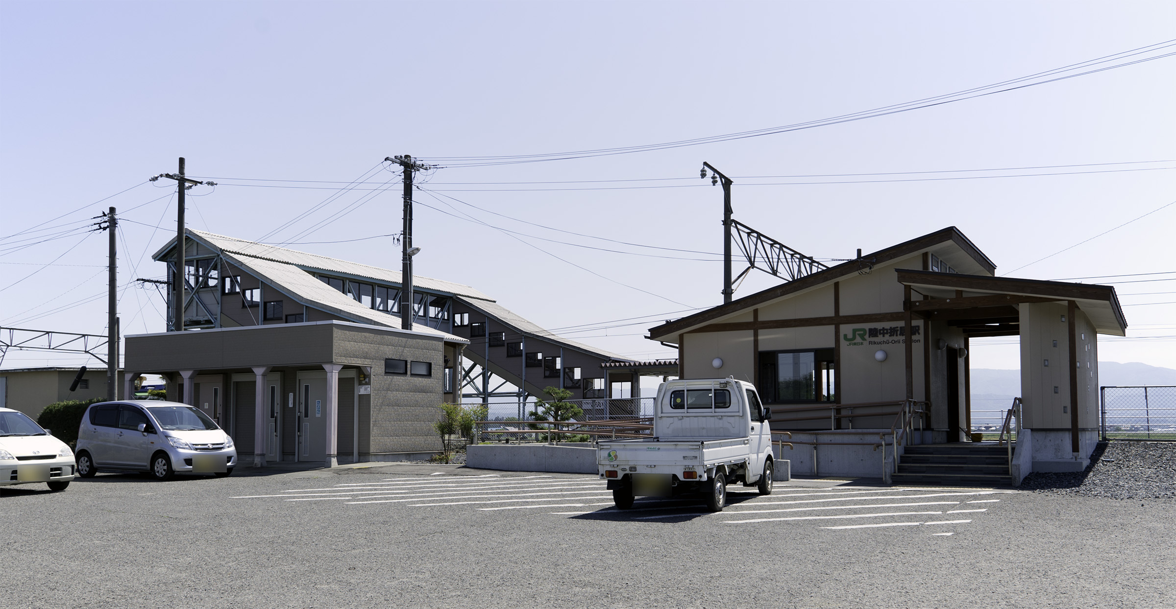 東日本旅客鉄道株式会社東北本線陸中折居駅全景